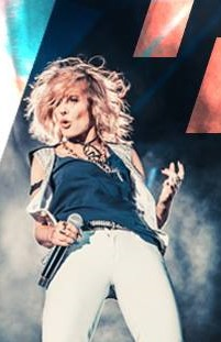 zdjęcie koncertowe